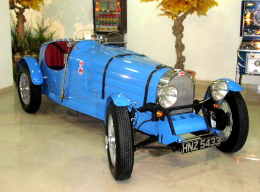 Bugatti T35 Replica